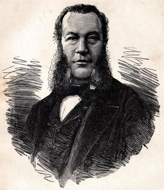 Italian politician and minister of the Kingdom of Italy